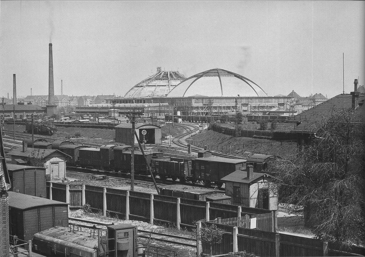 Blick von der heutigen Richard-Lehmann-Straße über das Vorgelände des Bayrischen Bahnhofes auf die Baustelle der Großmarkthalle in Leipzig.